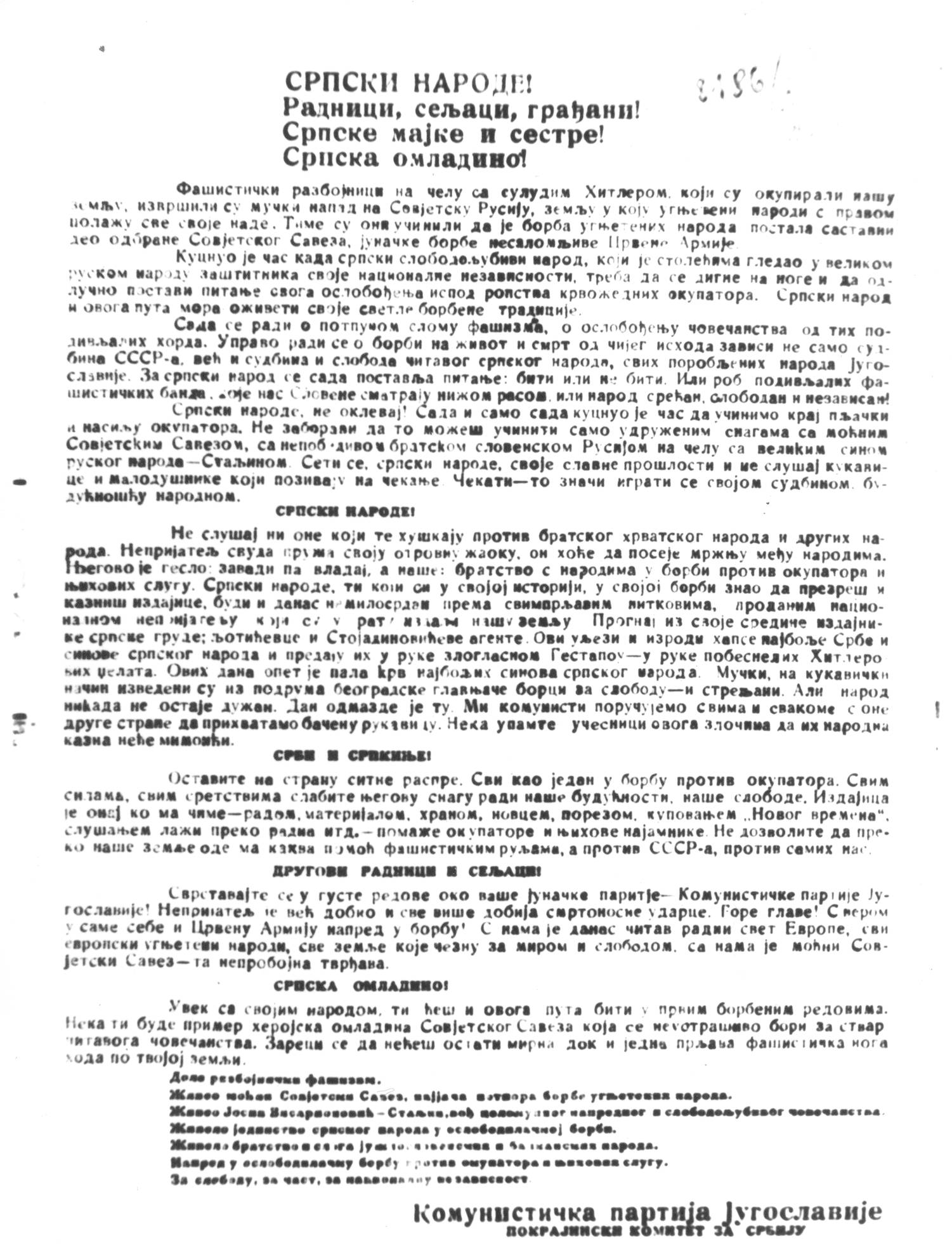 Srpskohrvatski / српскохрватски: Proglas PK Srbije povodom napada Nemačke na SSSR.